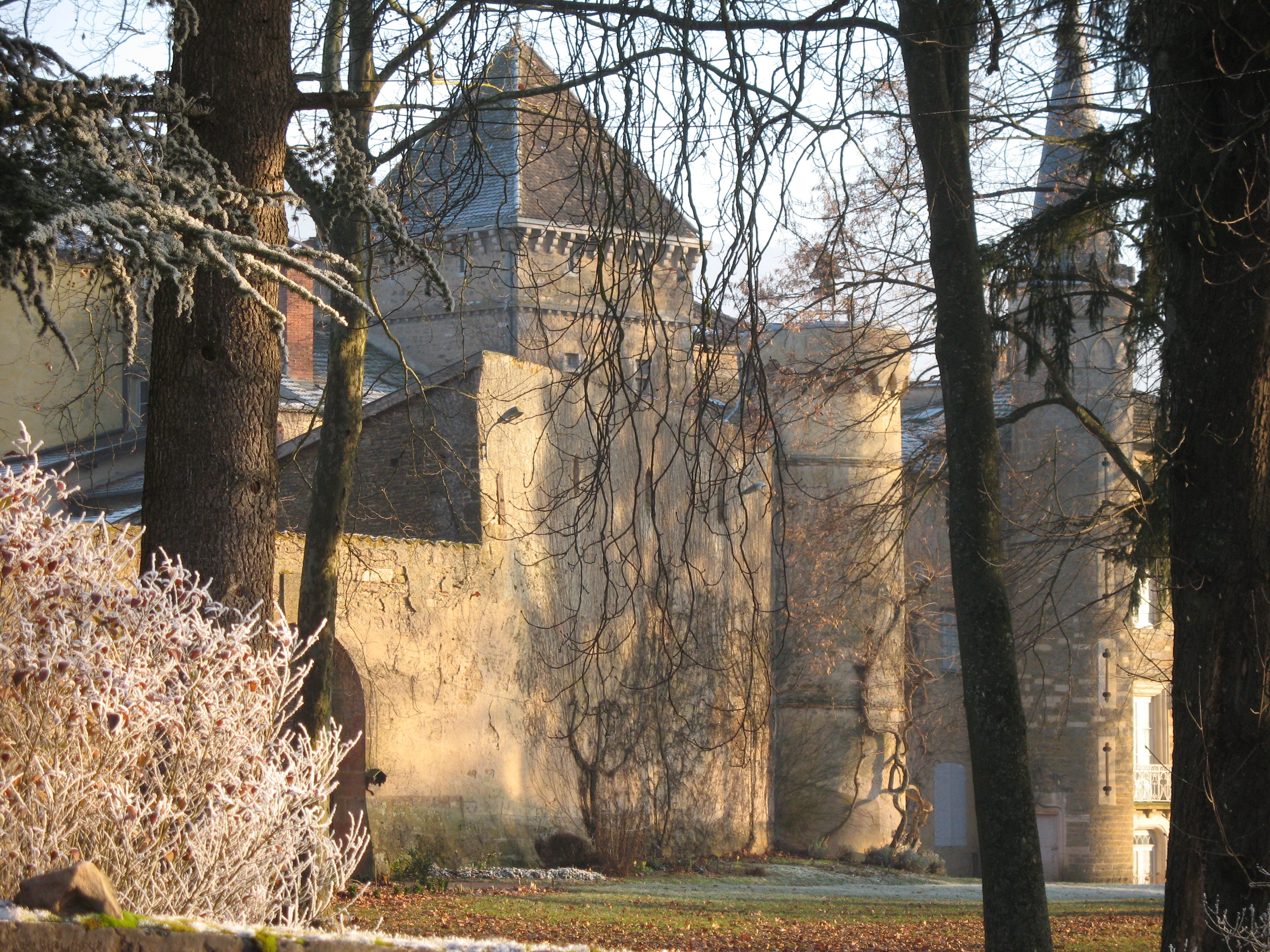 château de Saint-Point (Saône-et-Loire)